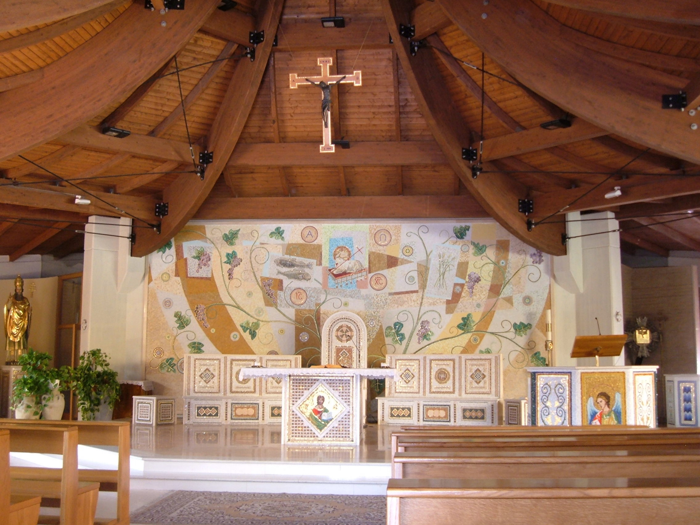 Chiesa di San Cleto, a Roma, nel quartiere San Basilio, in via Bernardino Bernardini. Interno.